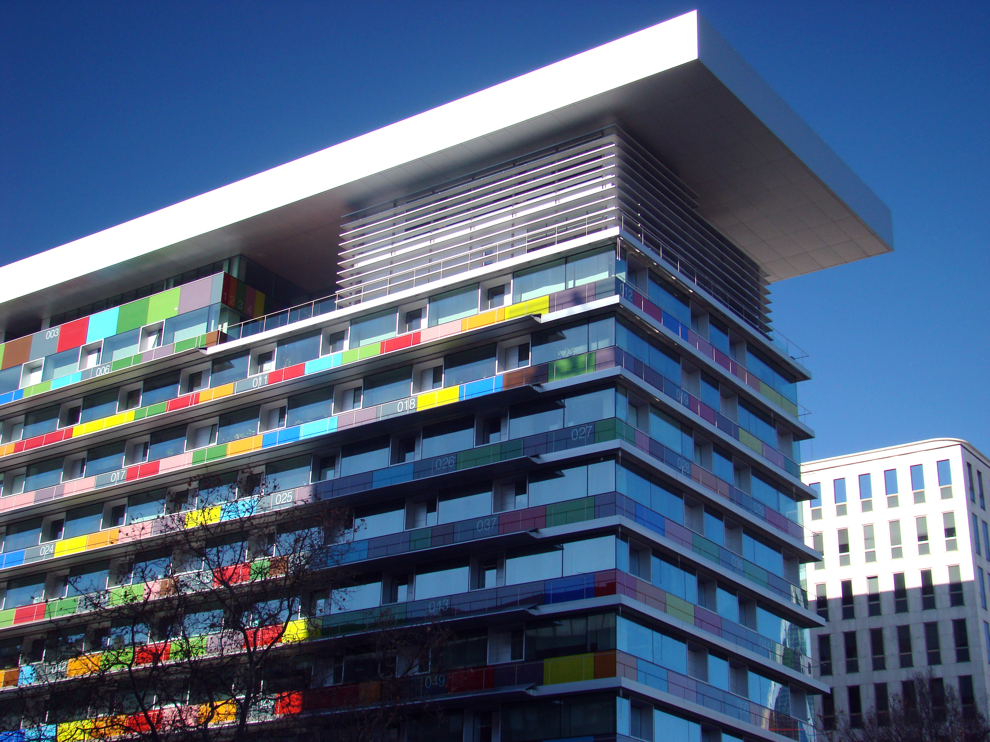 Vuela hasta este sitio / Fly to this location (Precisa / requires Google Earth) Ver en GoogleMaps / See in GoogleMaps Esta curiosa fachada se llama Diafragma Decafónico de Dígitos y es una obra del escultor Cruz Novillo. Es un sistema de transcripción de cifras a colores en el que cada color equivale a un dígito del 0 al 9...